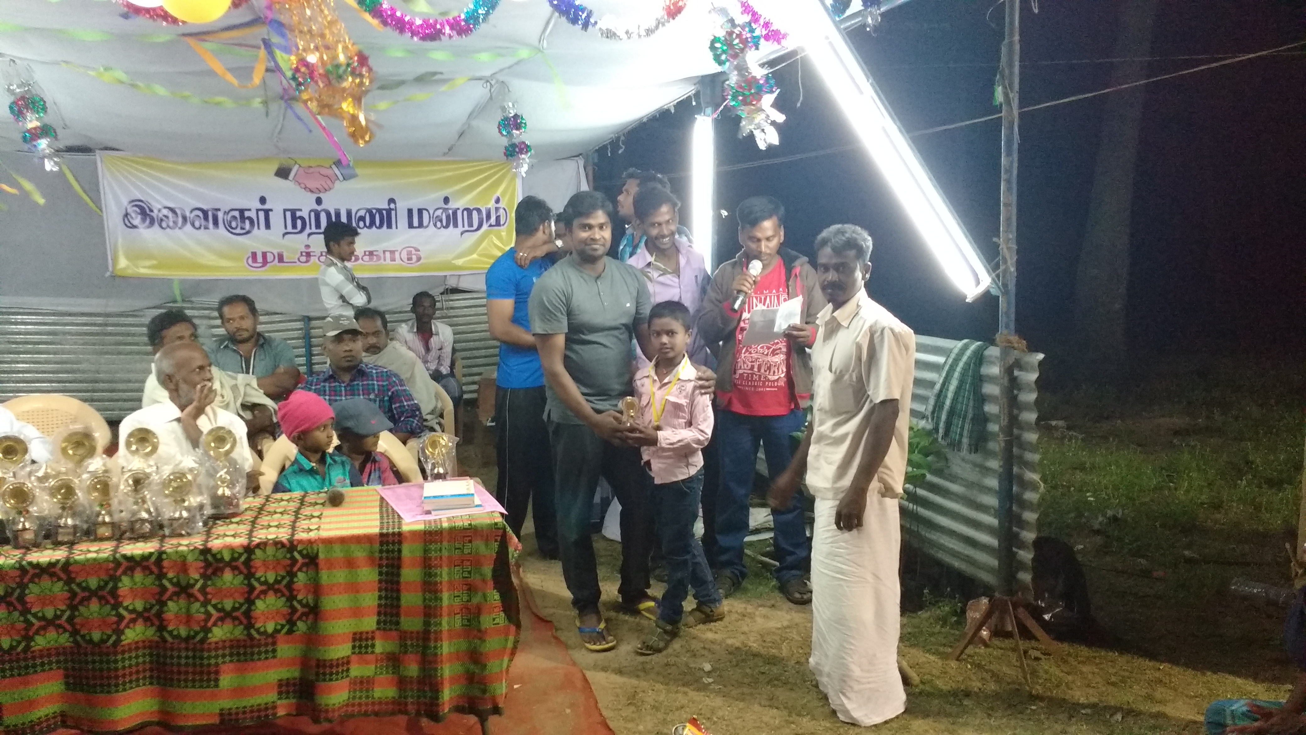 முடச்சிக்காடு இளைஞர் நற்பணி மன்றம்